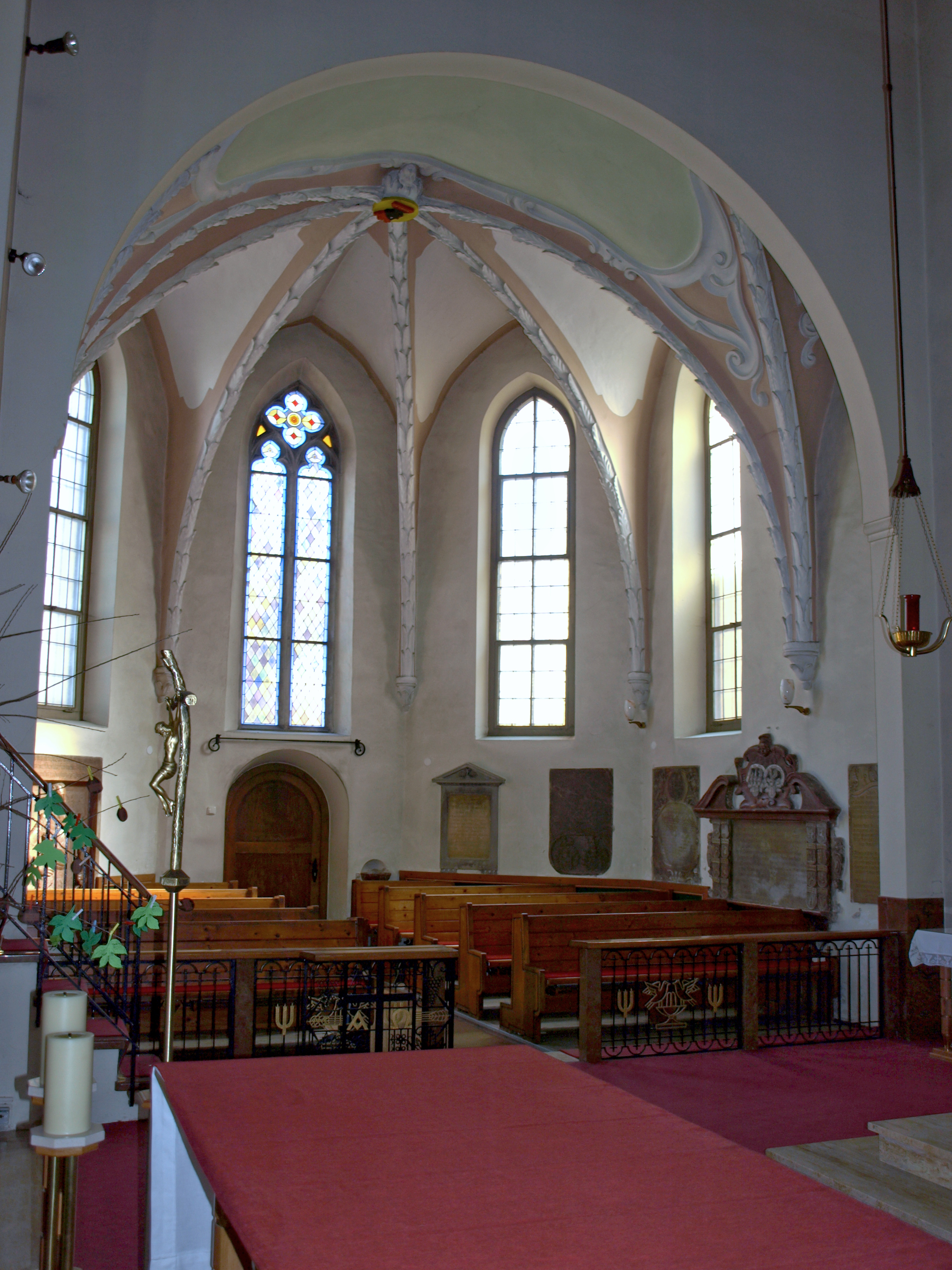 Kath. Pfarrkirche hll. Petrus und Paulus